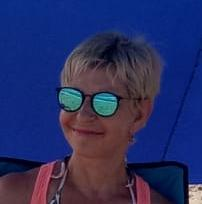 אליסה דור - תמונת פרופיל